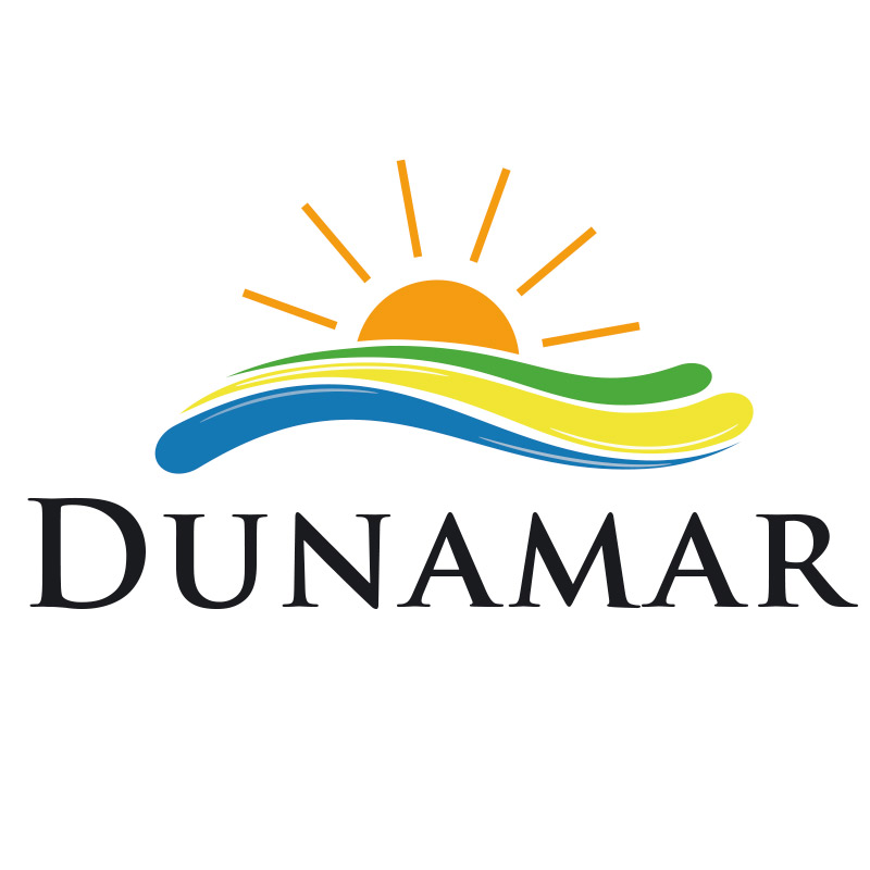 Escudo de Dunamar